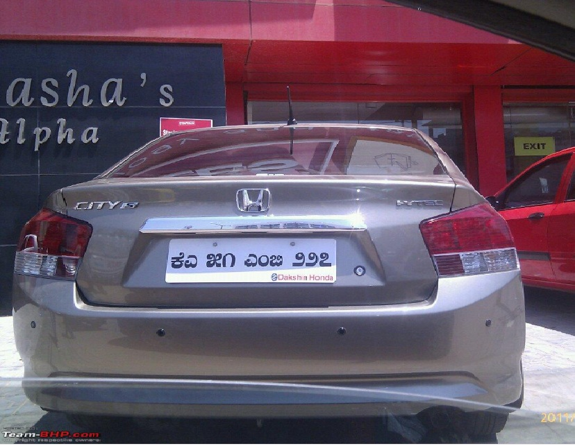 ಕನ್ನಡ: ವಾಹನವೊಂದರ ನೋಂದಣಿಯಲ್ಲಿ ಕನ್ನಡ ಸಂಖ್ಯೆಗಳ ಬಳಕೆ